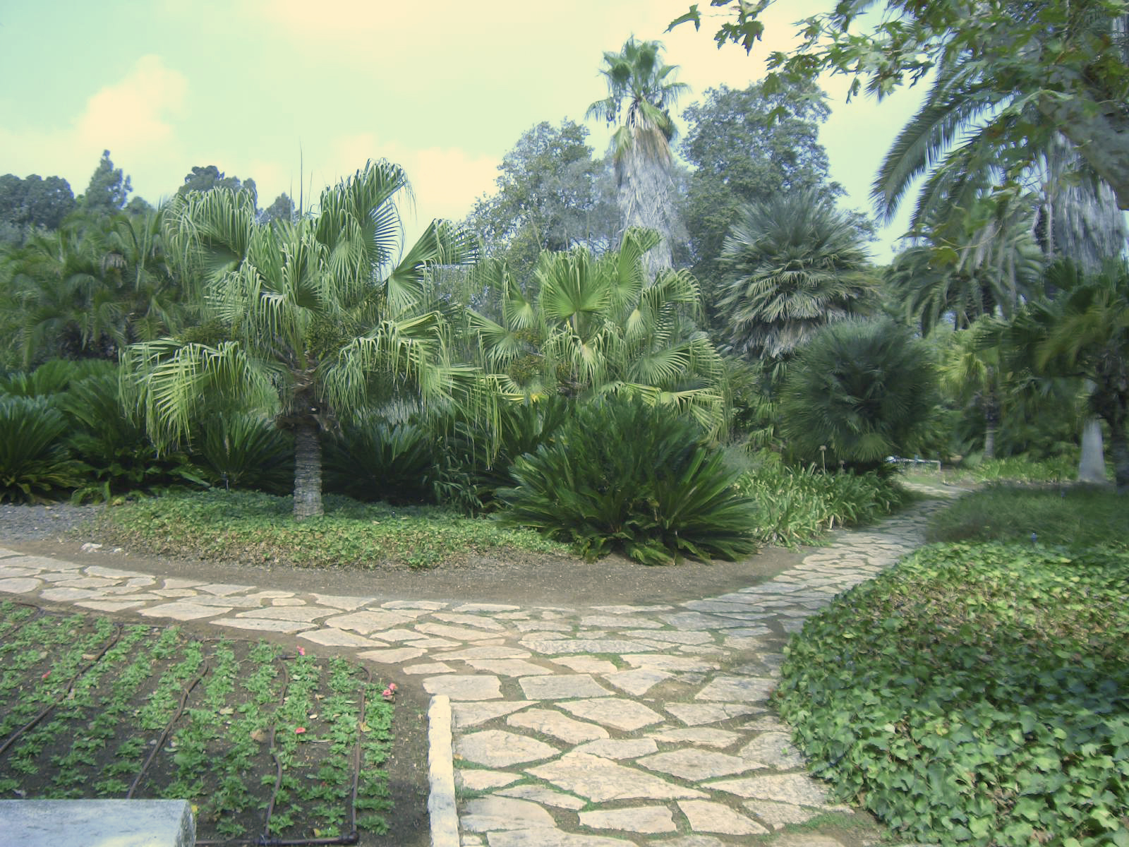 גן הדקלים ברמת הנדיב